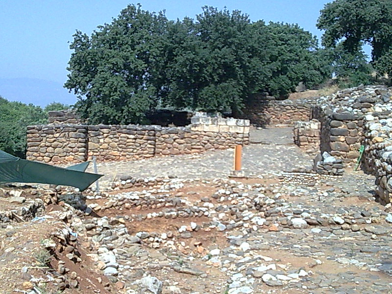 Tel Dan-Israeli Gate